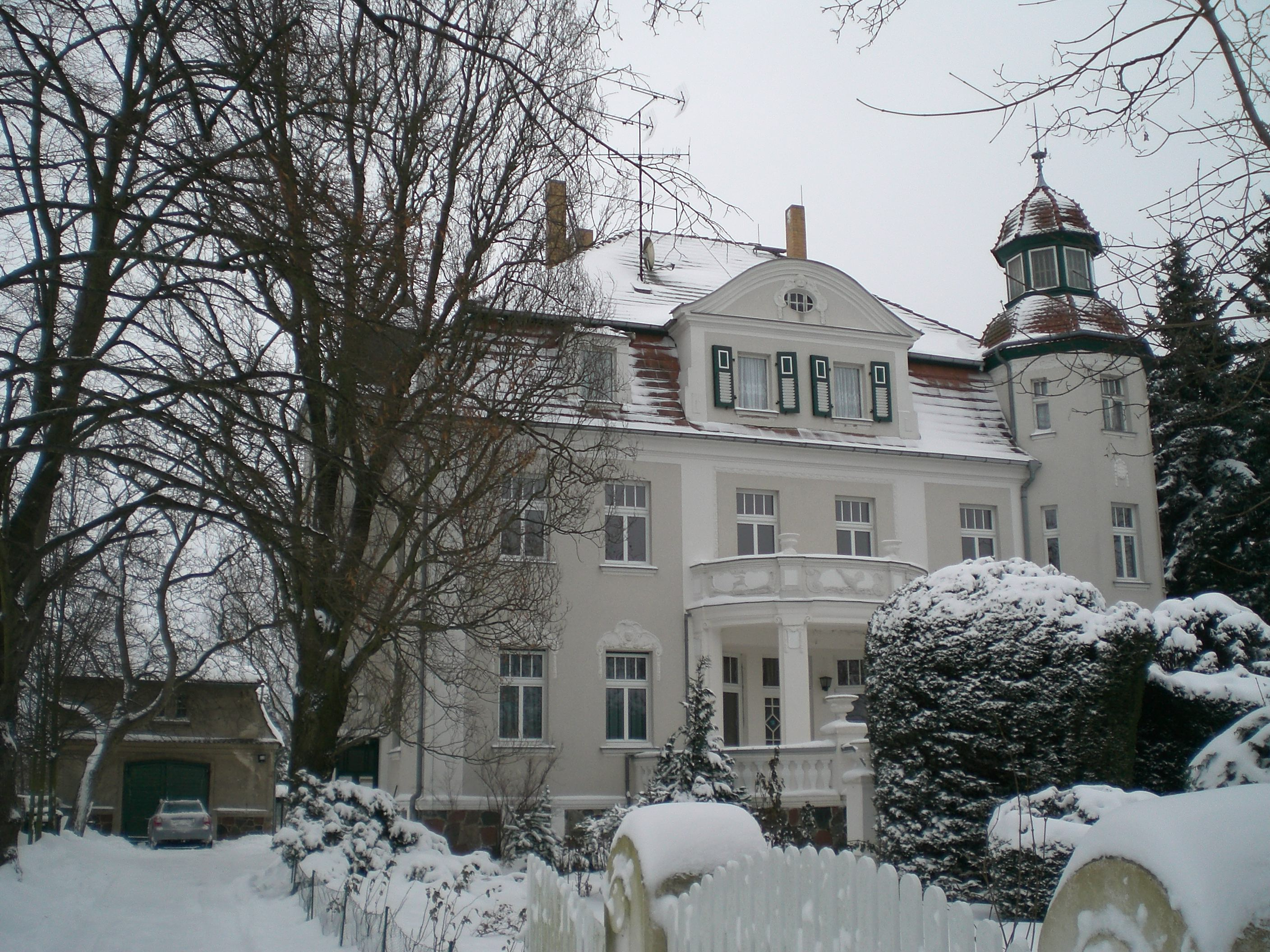 Villa Schöne, Wohnhaus des Gerbereibesitzer Schöne